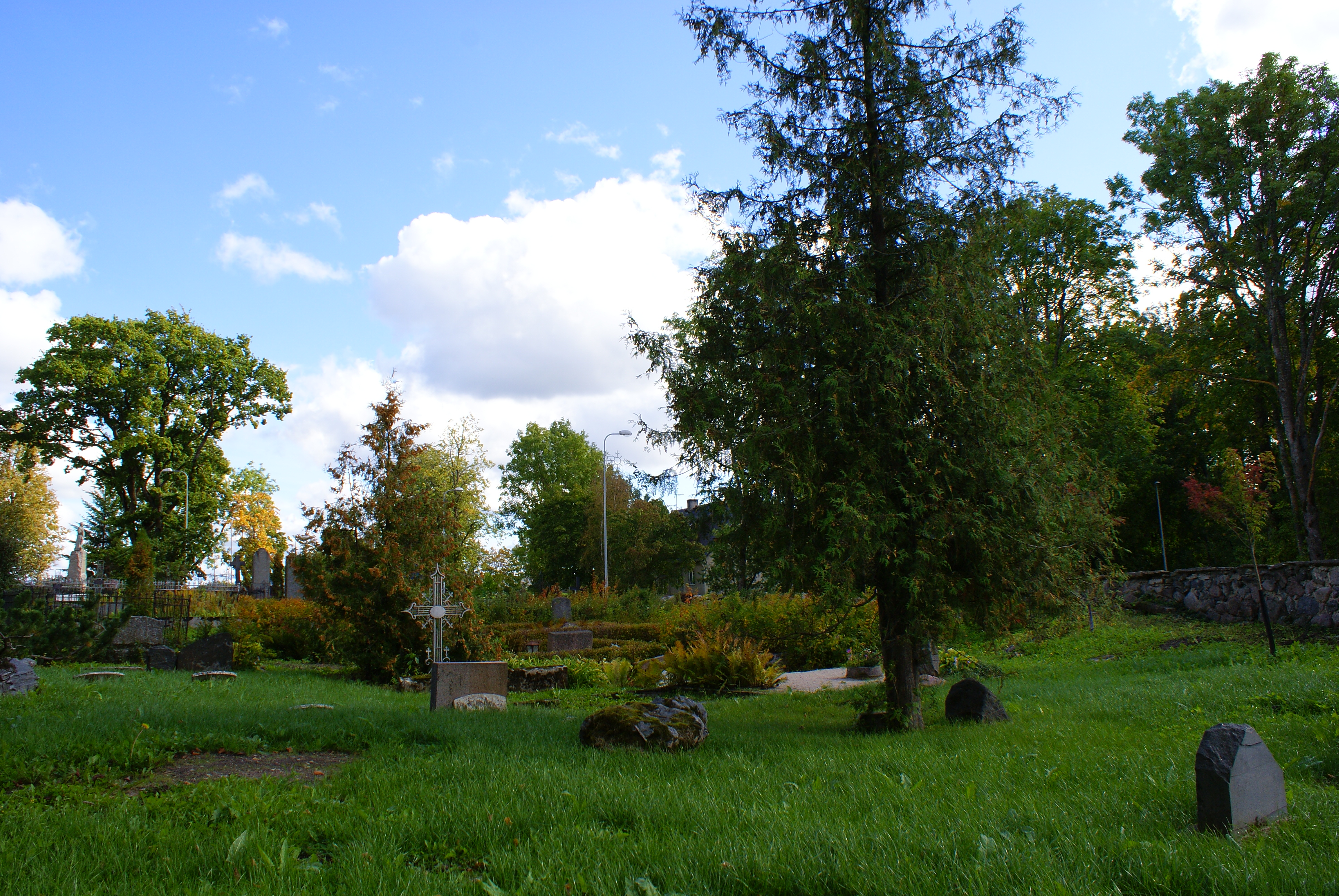 Jüri kirikuaed